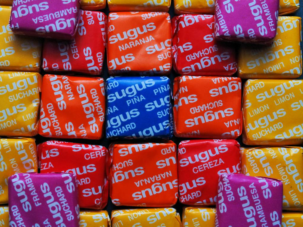 Sugus de varios sabores